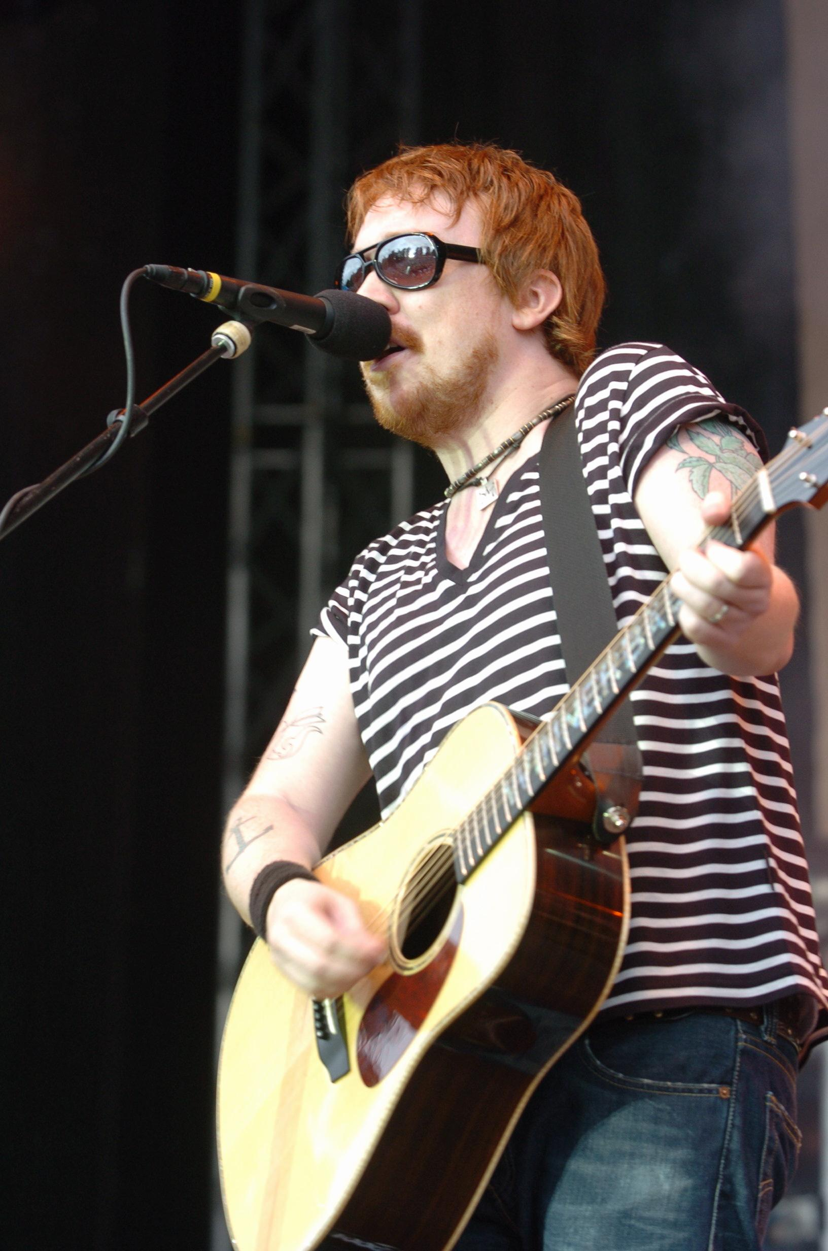 Fotat på Arvikafestivalen 2005.